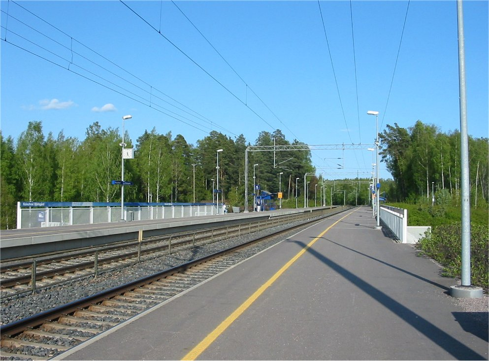 Koivuhovi station